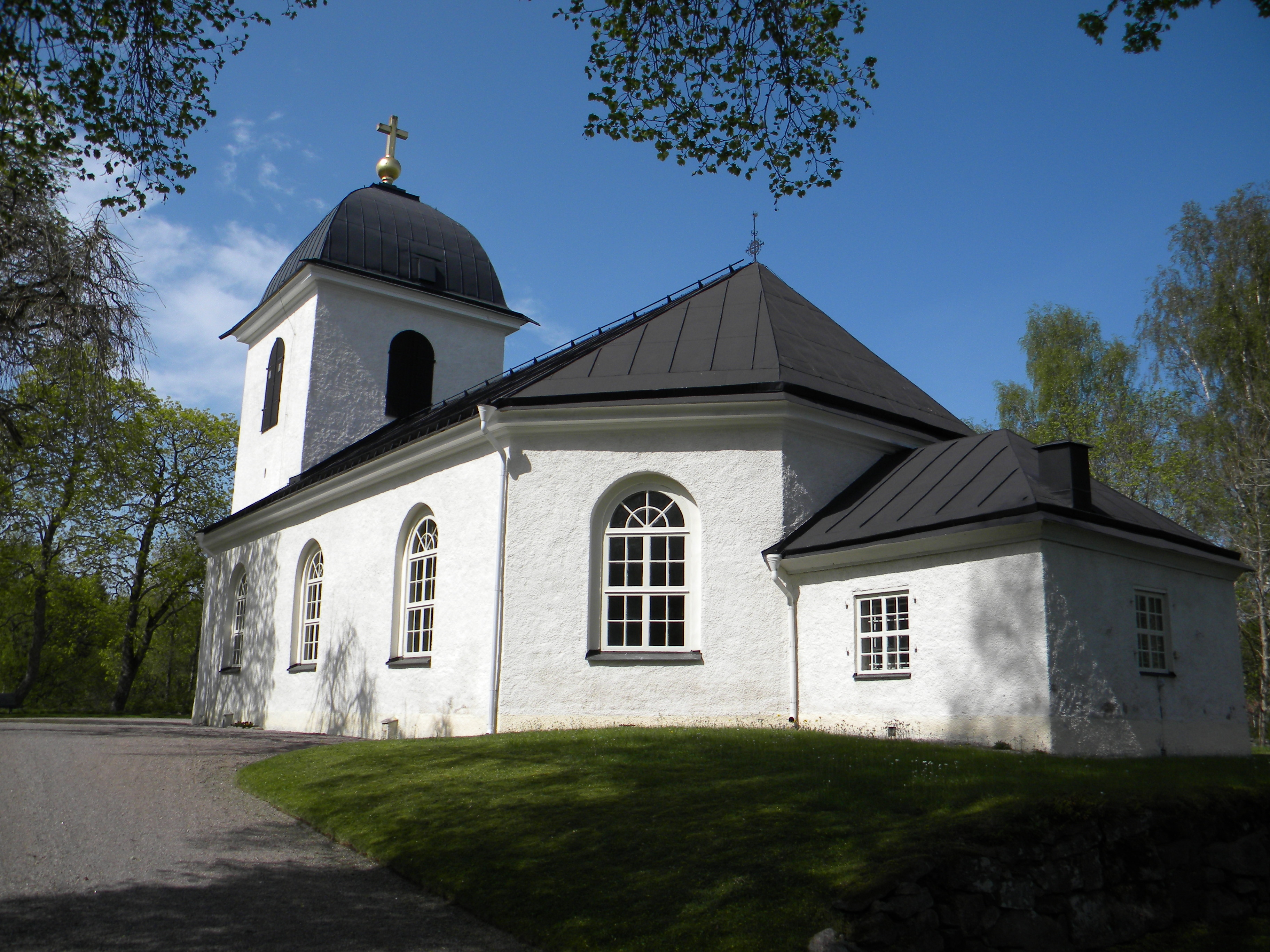 Kvarsebo kyrka